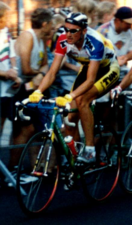 Danish bikerider Jesper Skibby during af streetrace (gadeløb) in Randers